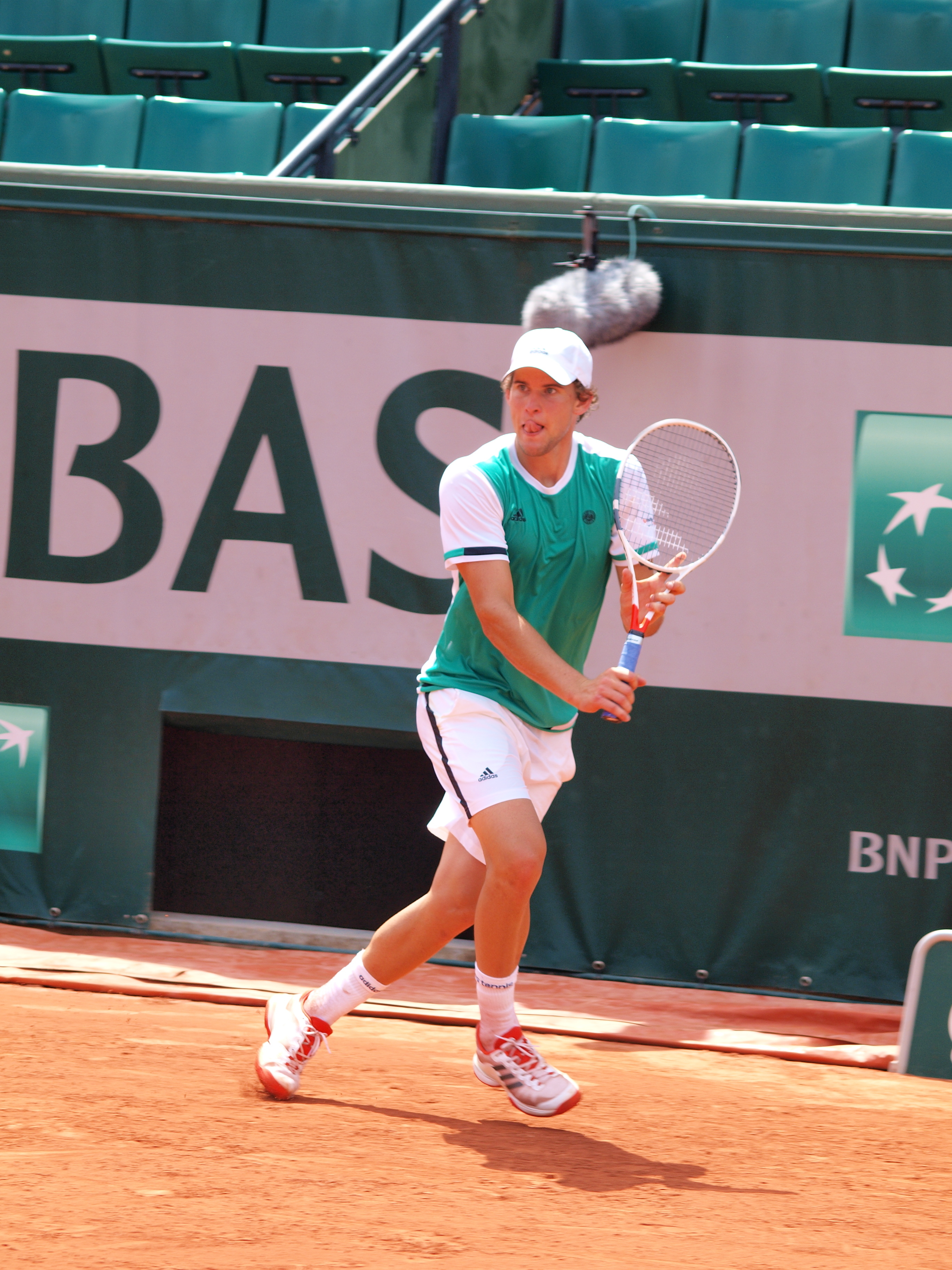 Dominic Thiem, aux Internationaux de France de Paris (Stade de Roland Garros) , le 31 mai 2017, dans son match contre Simone Bolelli